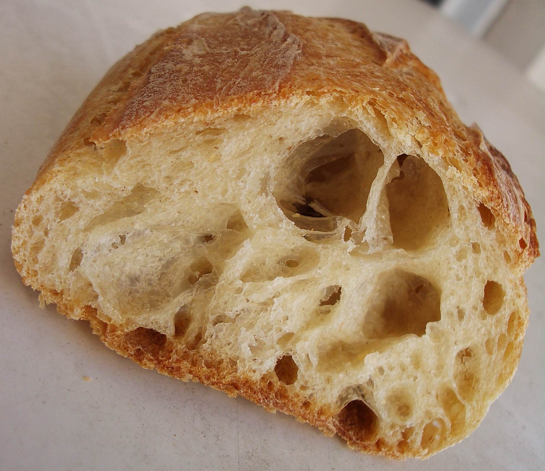 Pain au levain à l'ancienne. Goût assez fort, très alvéolé, croustillant.